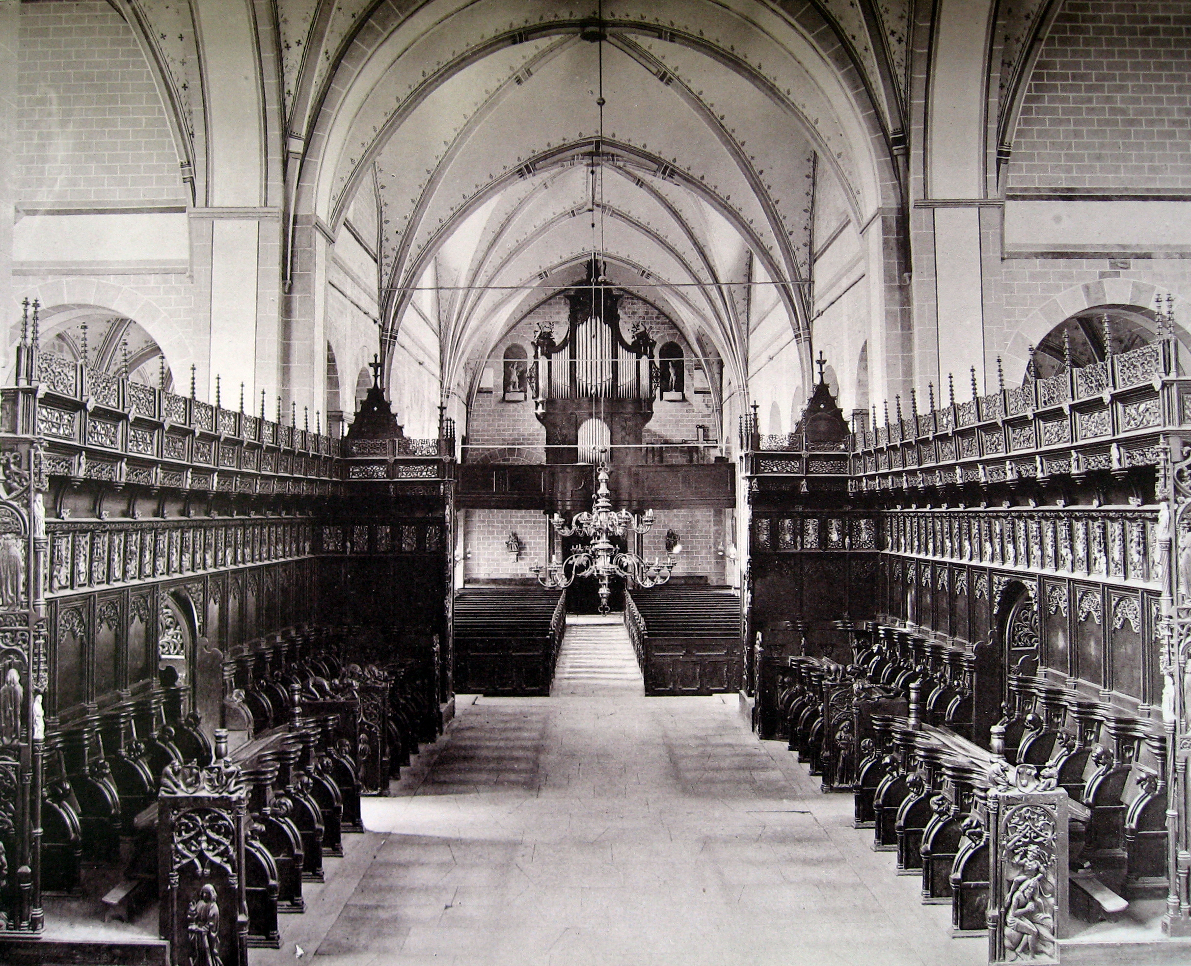 Cappenberg, Kirche, katholisch, romanisch, 12. Jahrhundert, Innenraum „Dreischiffige (dreijochige) Pfeilerbasilika mit Querschiff und zweijochigem Chor mit gothischem 5/8 Schluß. Ohne Thurm. Einfaches Glockenhaus neben der Nordseite der KKirche. Treppenthurm an der Nordseite des Chors, neu. Ursprünglich flach gedeckt; zu gothischer Zeit mit (verankerten) Kreuzgewölben versehen; im mittleren Joche des Mittelschiffs ein Sterngewölbe. Strebepfeiler vereinzelt.Die rundbogigen Fenster theilweise spitzbogig verbreitert; letztere dreitheilig mit Maßwerk. Drei Eingänge: an der Westseite, an der Nordseite des nördlichen und an der Ostseite des südlichen Querschiffs, ohne Schmuck. An der Ostseite des nördlichen Querschiffs nach außen vortretende Nische (Rest einer halbkreisförmigen Apsis).“